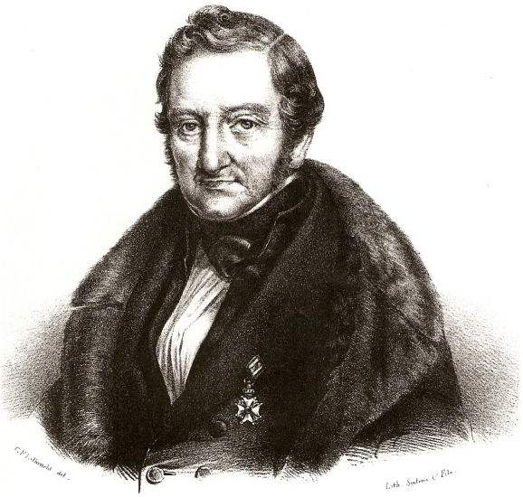 Petrus Hendriksz naar een litho van Soetens & Fils